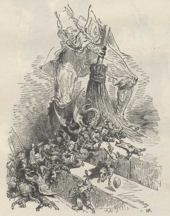 "A Varredura das histórias fantásticas" (1863), iIustração por Gustave Doré para “Don Quixote“ de Miguel de Cervantes.